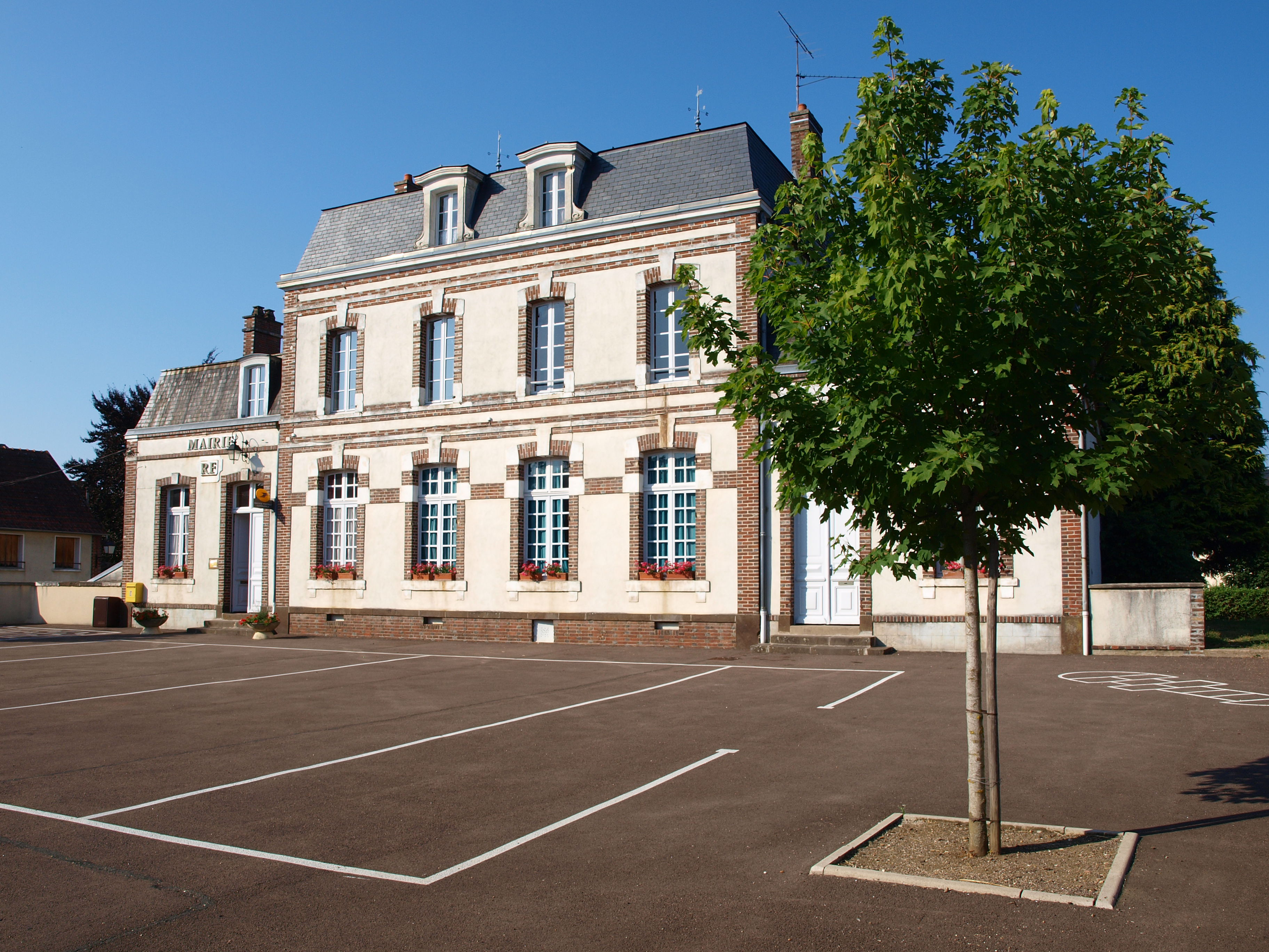 Mézilles (Yonne, France) ; l'école primaire & la mairie.